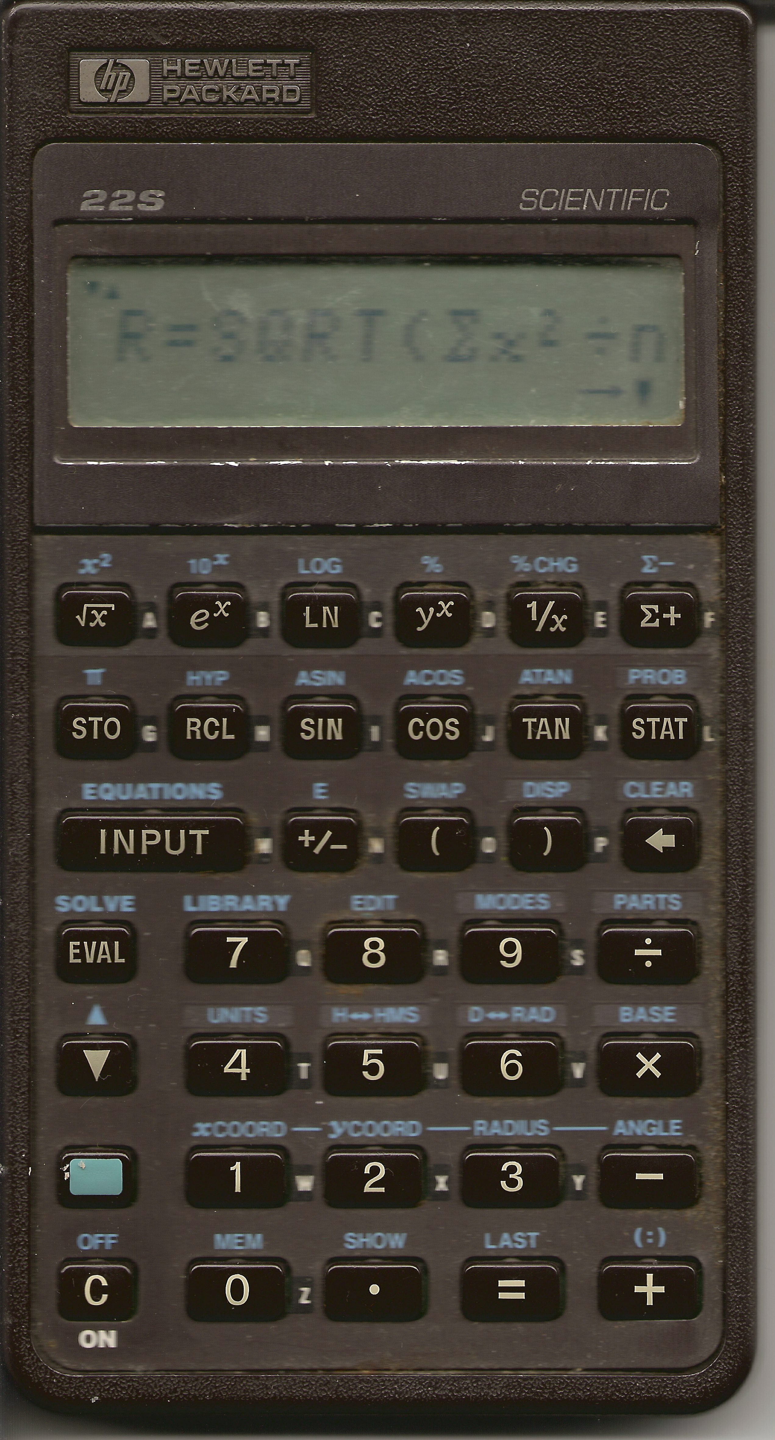 Hewlett-Packard scientific calculator, front (HP-22S), bought in 1989